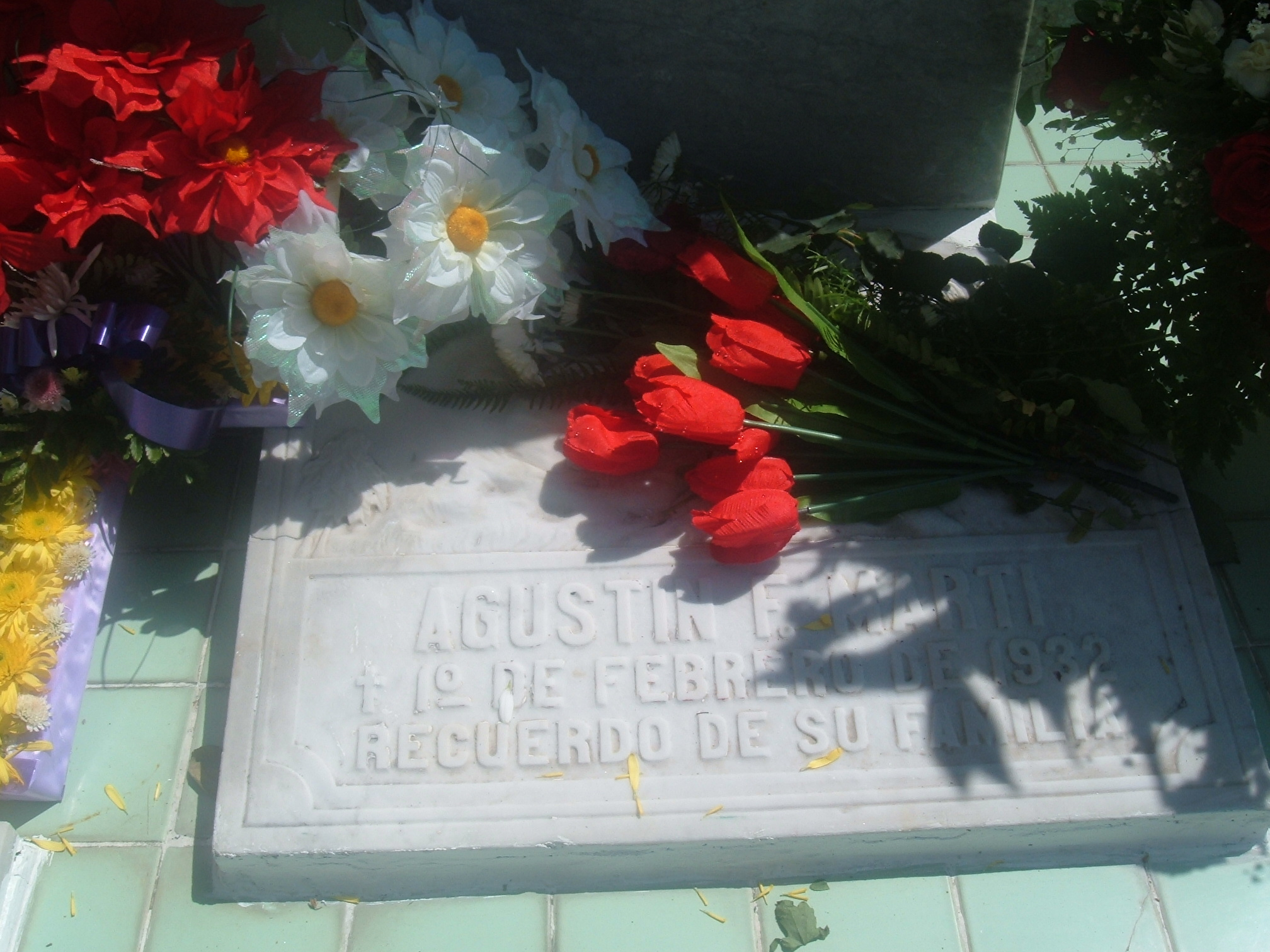 Farabundo Martí´s tombstone(salvadorean politician) in Cementerio de los Ilustres, San Salvador, El Salvador.